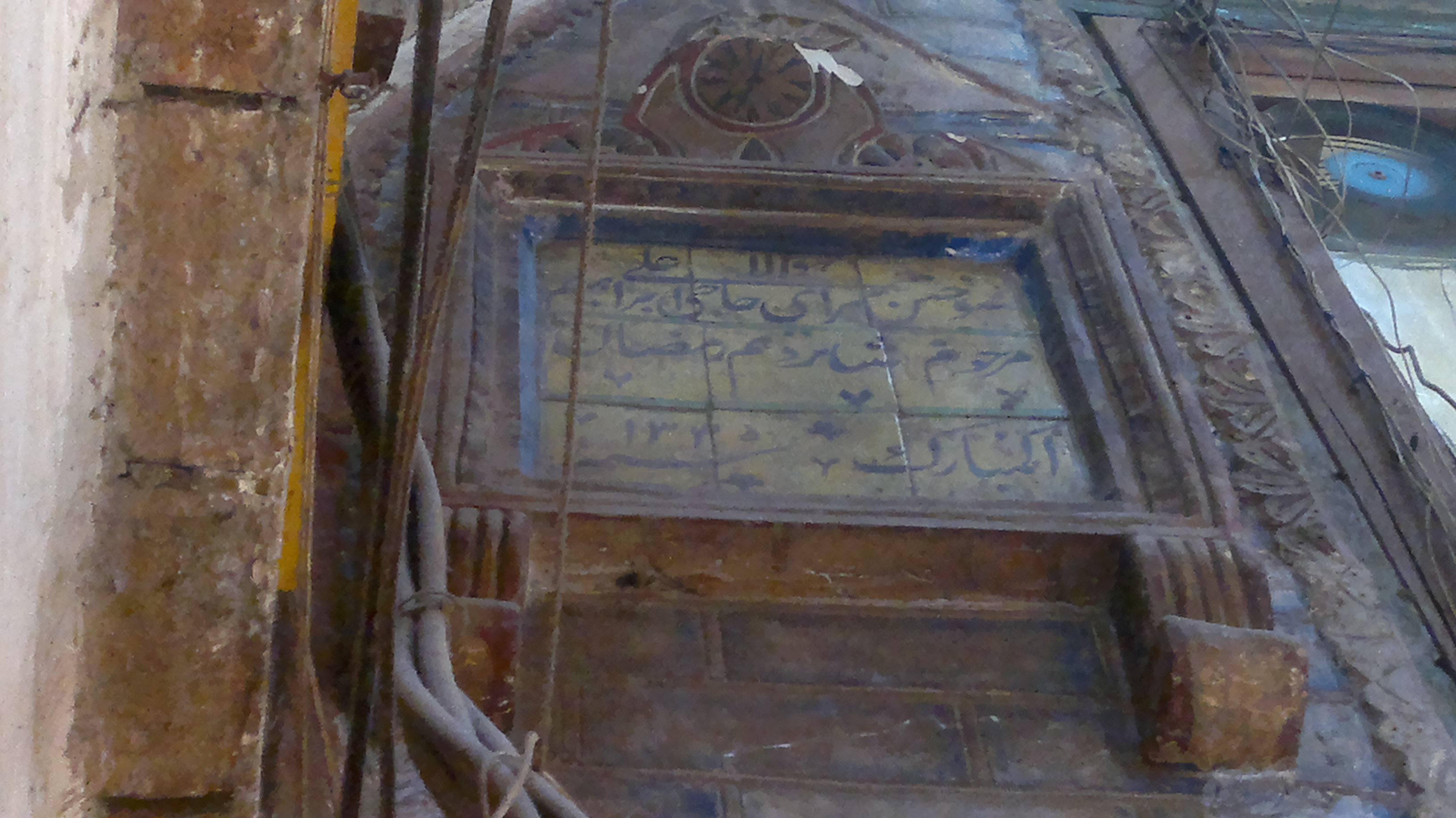 کتیبه سوختن بازار اورمیه در تاریخ 1335 قمری